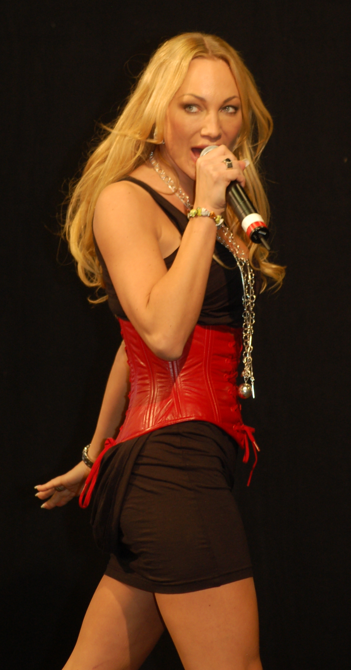 Charlotte Perrelli På Rejmes i Norrköping.